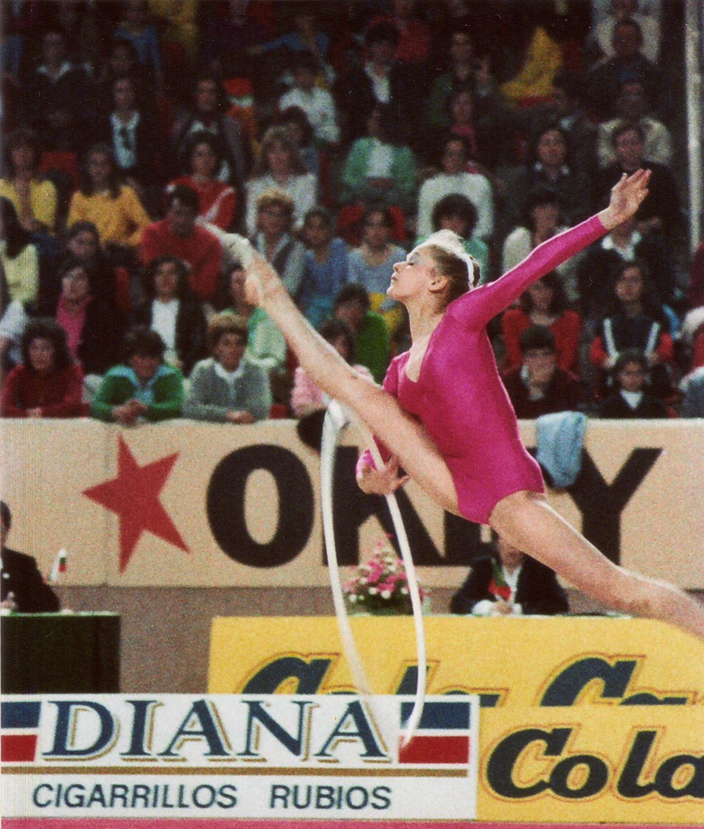 La gimnasta soviética Dalia Kutkaite en el IV Torneo Internacional Ciudad de Valladolid en 1984.